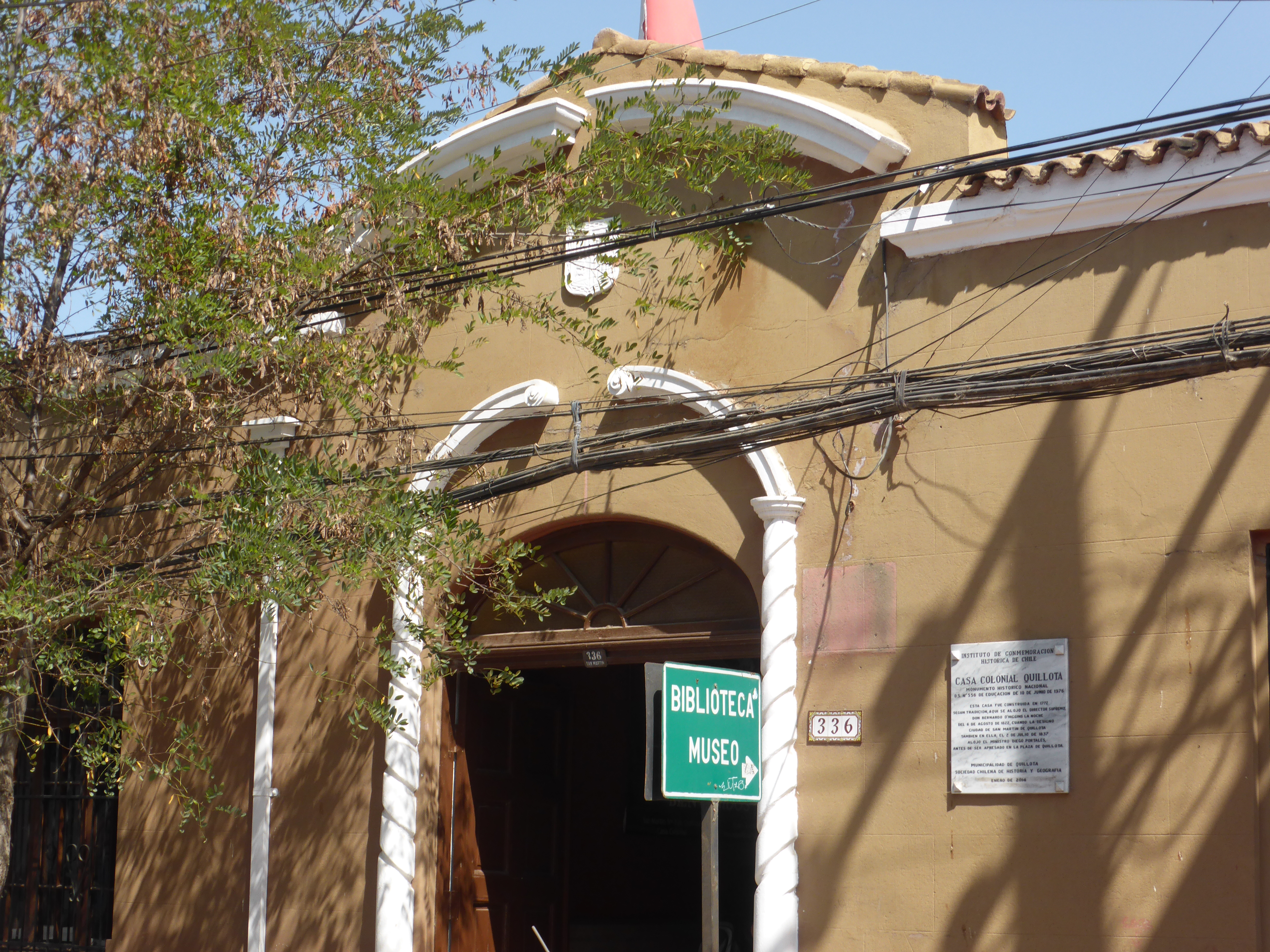 El Museo Histórico-Arqueológico de Quillota está situado en la calle San Martín, número 336, en la ciudad de Quillota. Región de Valparaíso, provincia de Quillota, Chile.